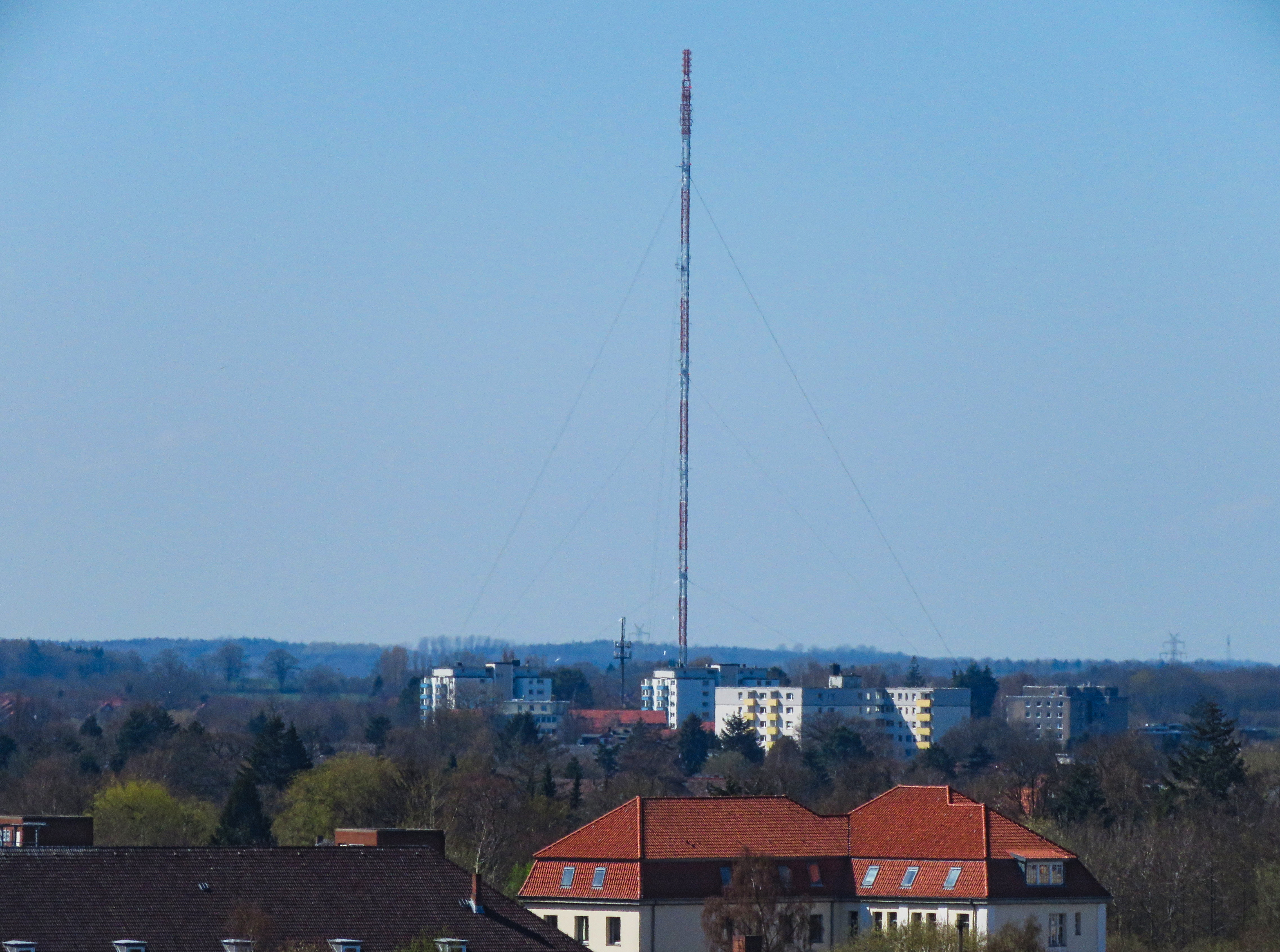 Sender Kiel Kronshagen